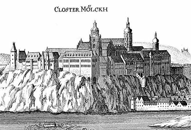 Melk Abbey (Stift Melk) before its renovation by Jakob Prandtauer.